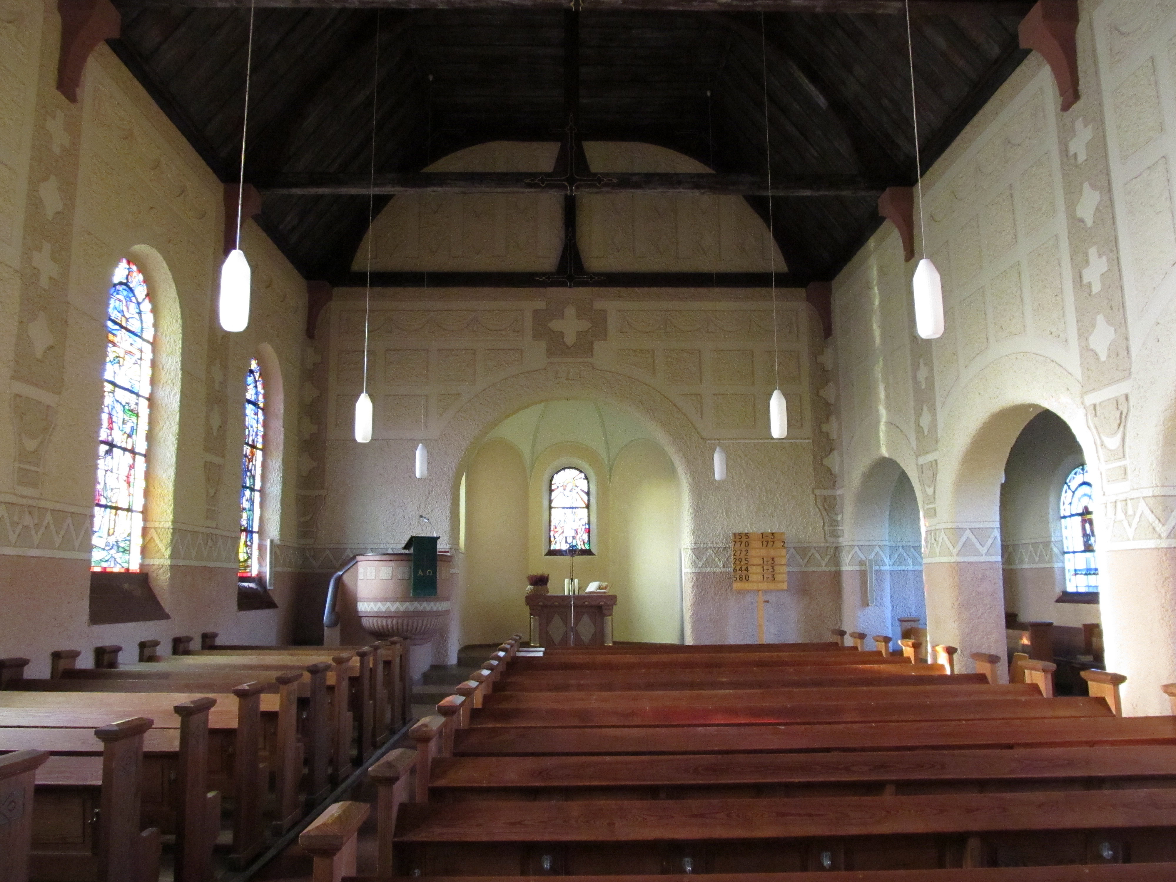 Blick ins Innere der protestantischen Kirche in Hassel, einem Stadtteil von St. Ingbert, Saarland